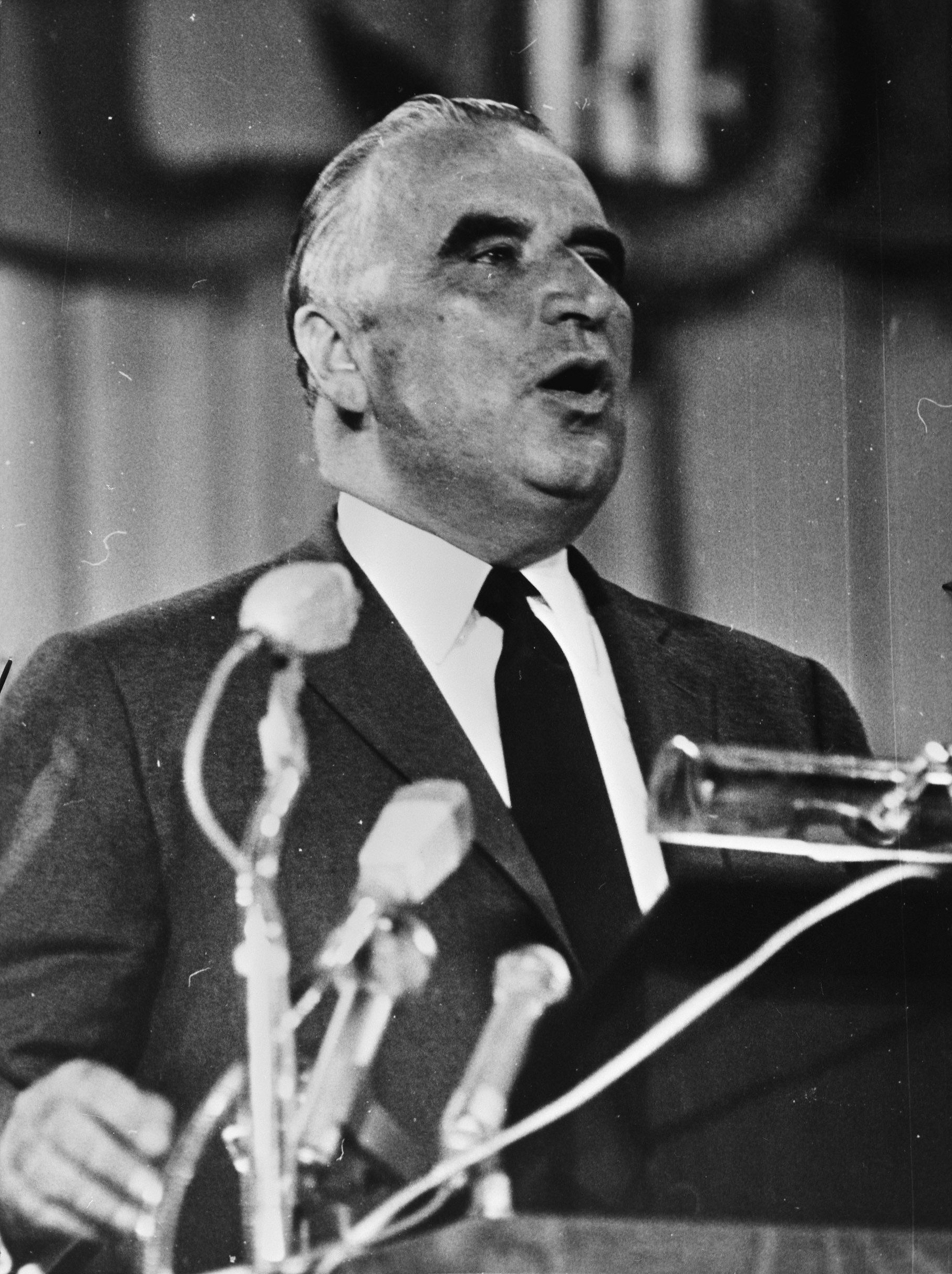 Collectie / Archief : Fotocollectie Anefo Reportage / Serie : [ onbekend ] Beschrijving : Georges Pompidou , kandidaat voor presidentsverkiezingen, Frankrijk Datum : 29 april 1969 Locatie : Frankrijk Trefwoorden : kandidaten Persoonsnaam : Pompidou, Georges Fotograaf : Mieremet, Rob / Anefo Auteursrechthebbende : Nationaal Archief Materiaalsoort : Negatief (zwart/wit) Nummer archiefinventaris : bekijk toegang 2.24.01.04 Bestanddeelnummer : 922-3543